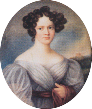 Emma von Gemmingen geb. von Uttenhofen (1804–1846), Frau von Karl Reinhard von Gemmingen (1797–1882)